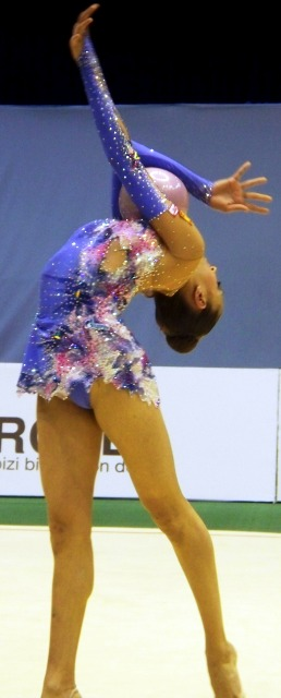 Евгения Канаева (Россия). ЧЕ в Баку 2009